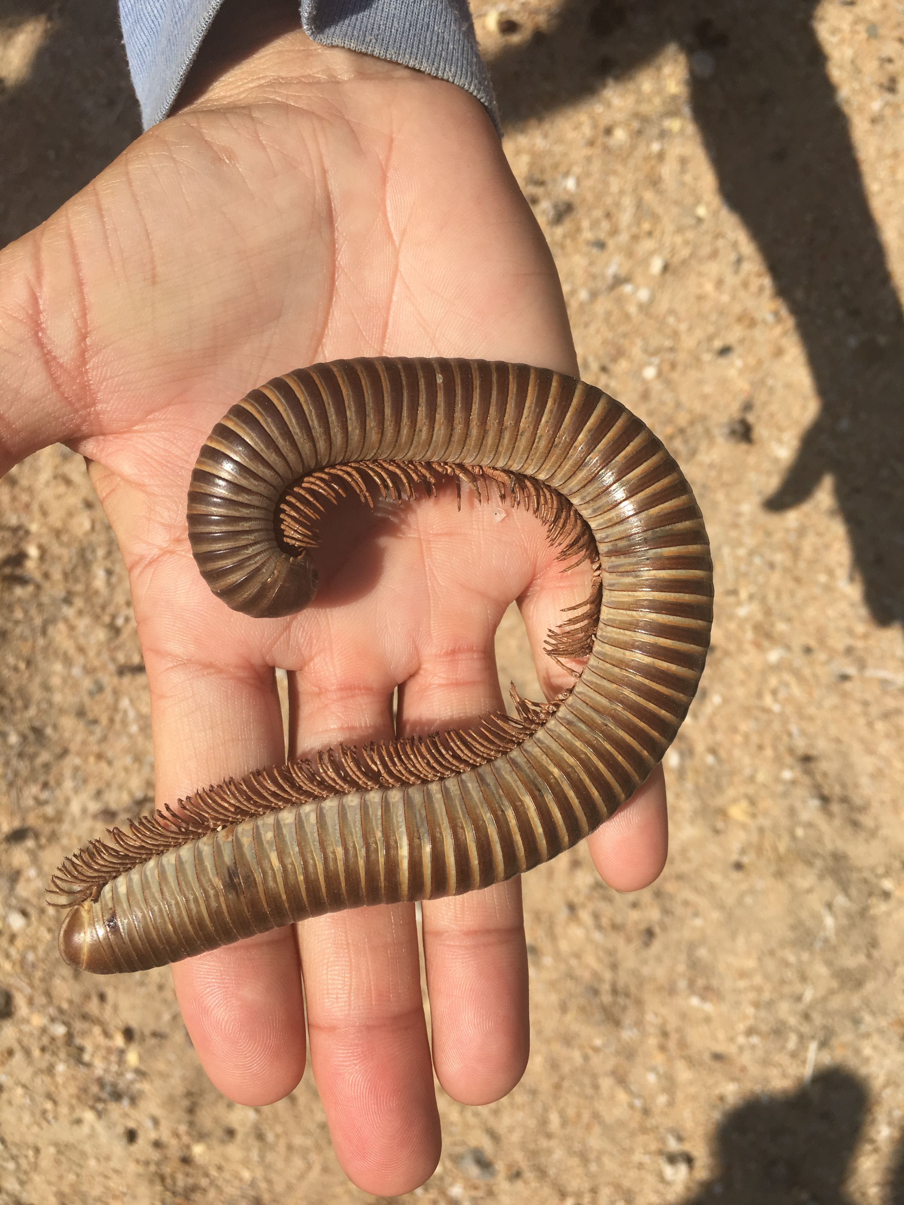 Größenvergleich eines Tausendfüßers Spirostreptidae spec.4 mit einer menschlichen Hand